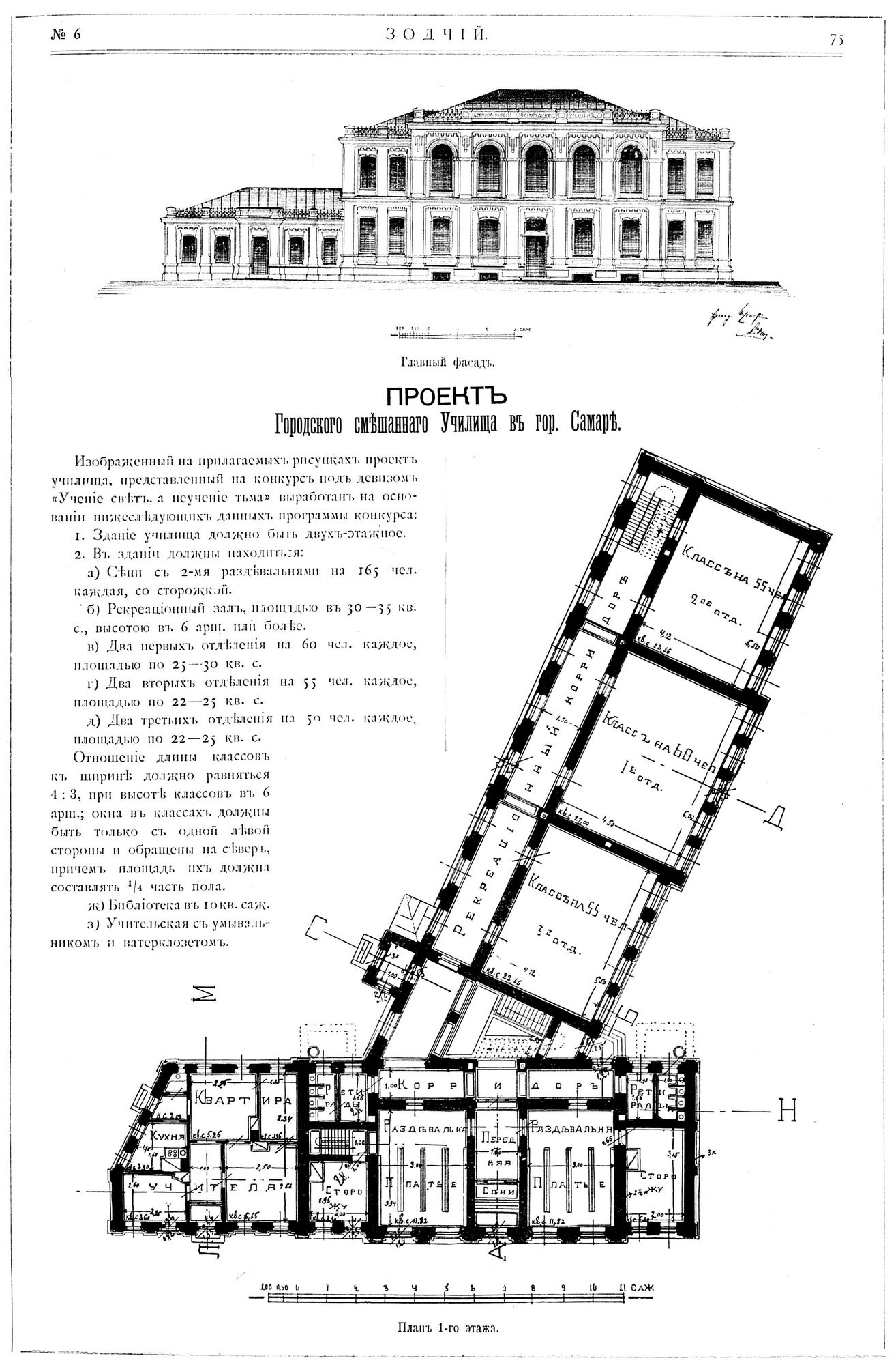 Енш А.К. Проект городского смешанного училища в Самаре, 1900. Первая премия конкурса